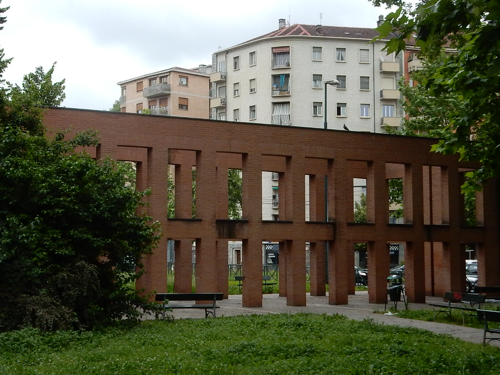 Largo Orbassano opera di Pier Kirby